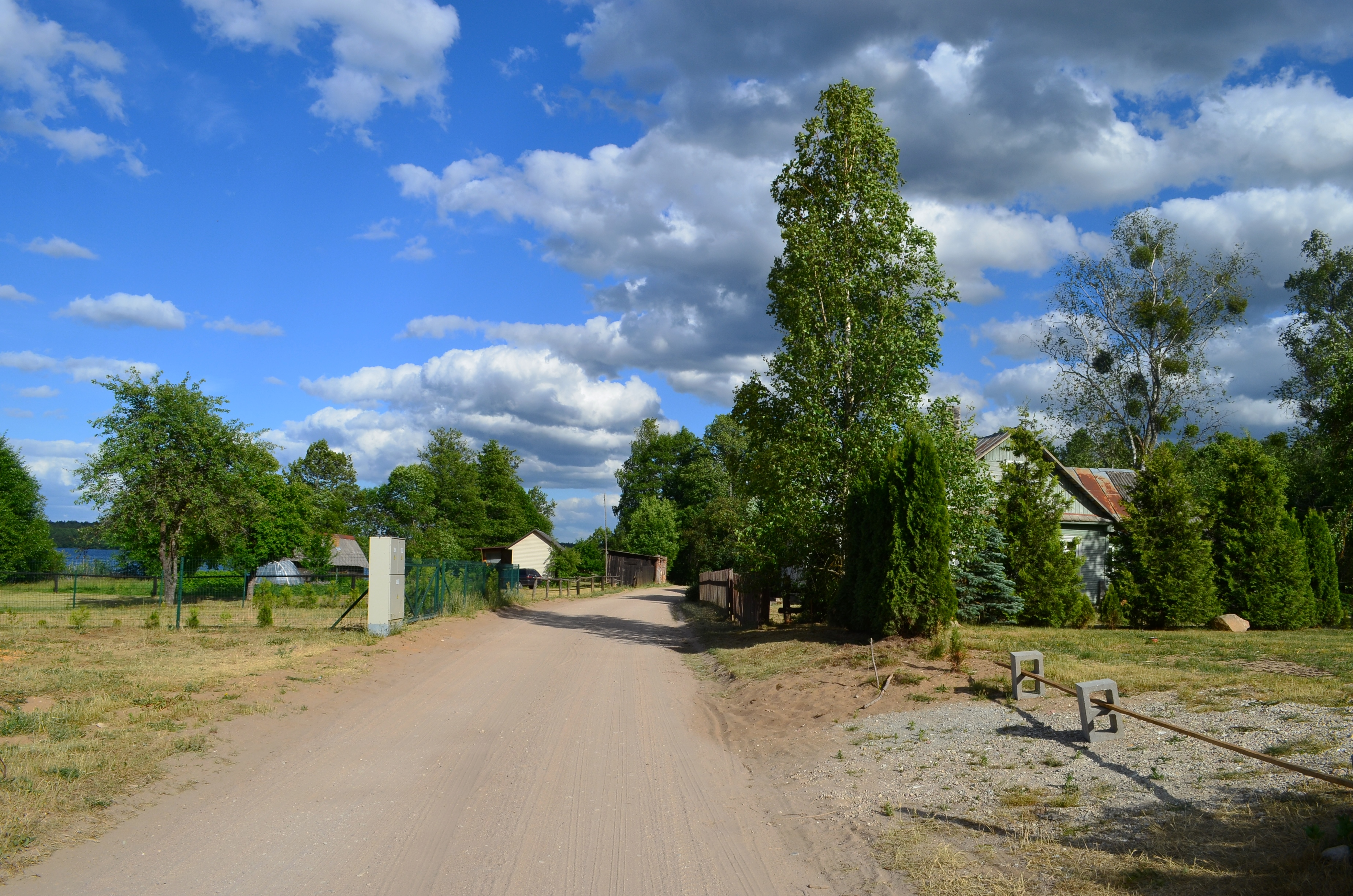 Lavysas, Varėnos raj.